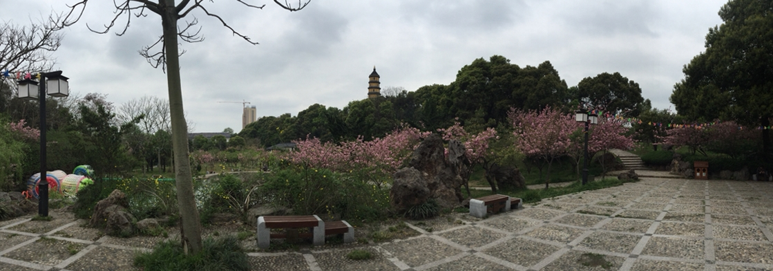 宝塔山公园的广场上拍摄的宝塔山公园半全景